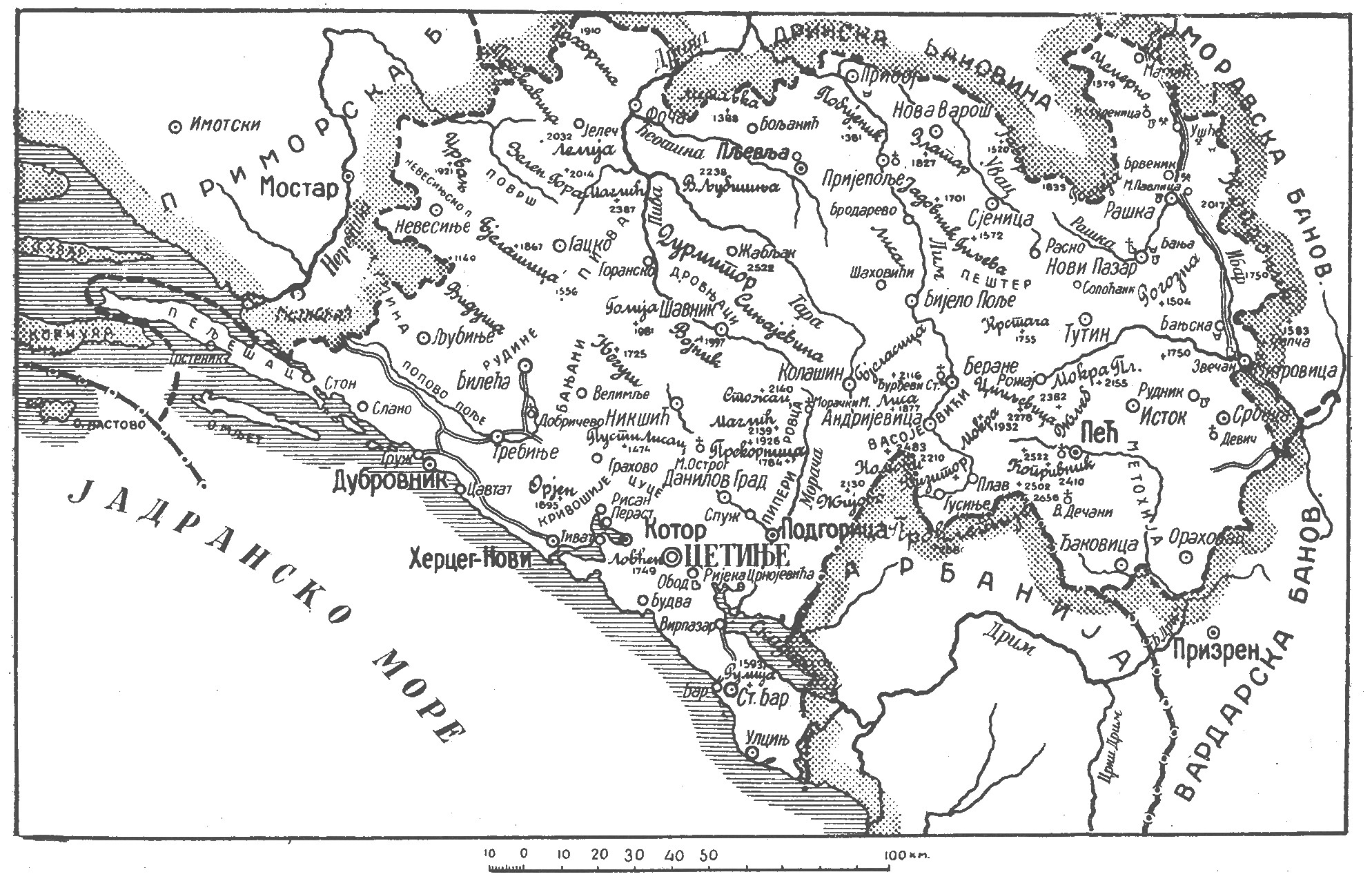 Карта Зетске бановине.